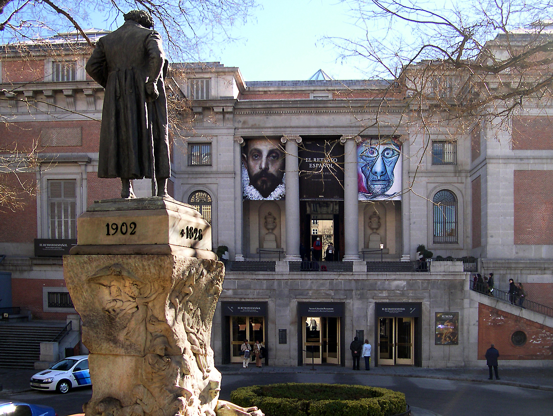 Puerta de Goya en la fachada norte del Museo del Prado de Madrid (España). Obra de Juan de Villanueva. En primer plano, monumento a Goya, realizado por Mariano Benlliure e inaugurado en 1902.